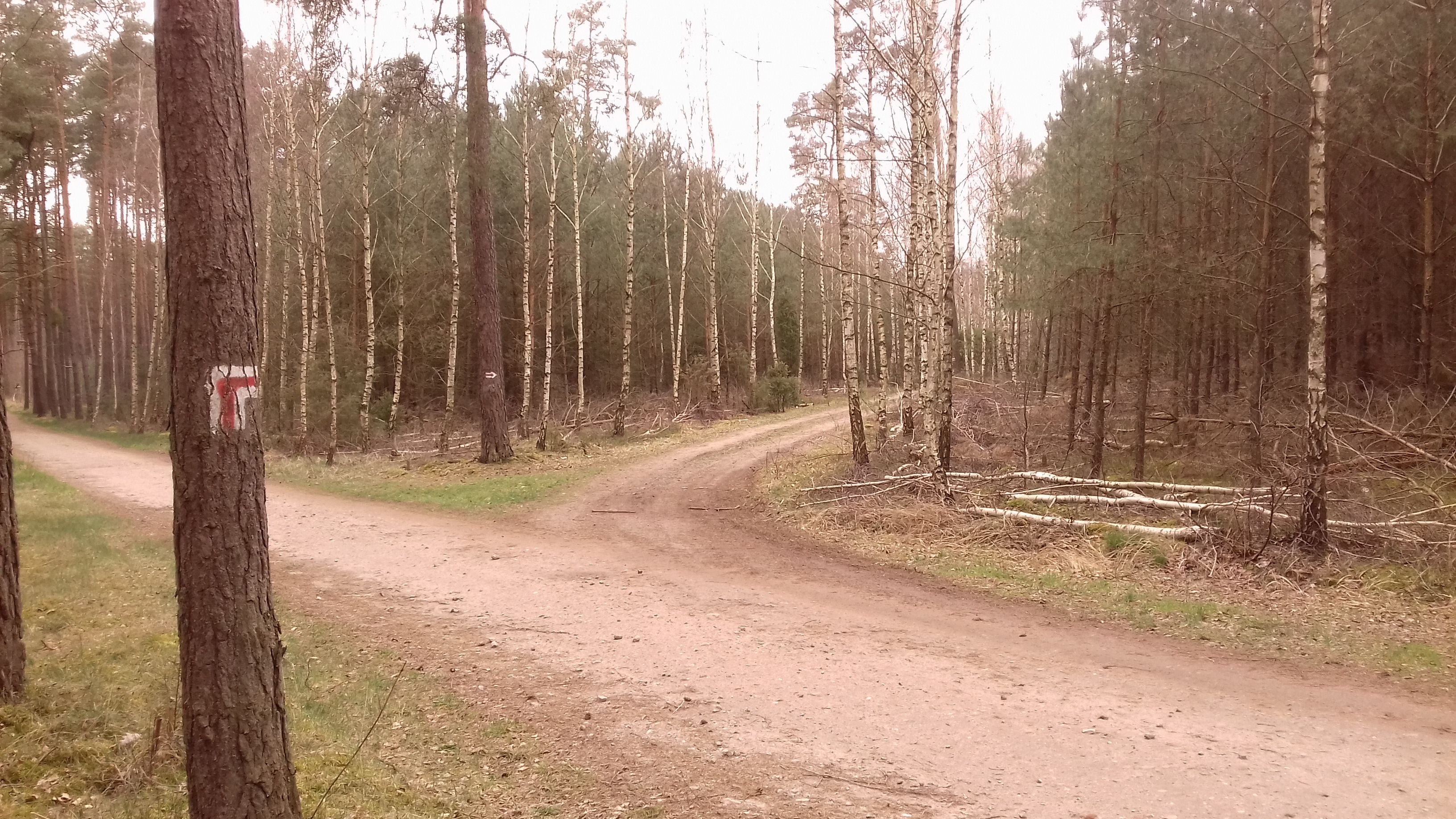 Końcowy fragment szlaku w rejonie skrzyżowania ze szlakiem niebieskim nr 3573 - droga leśna do Drużyny